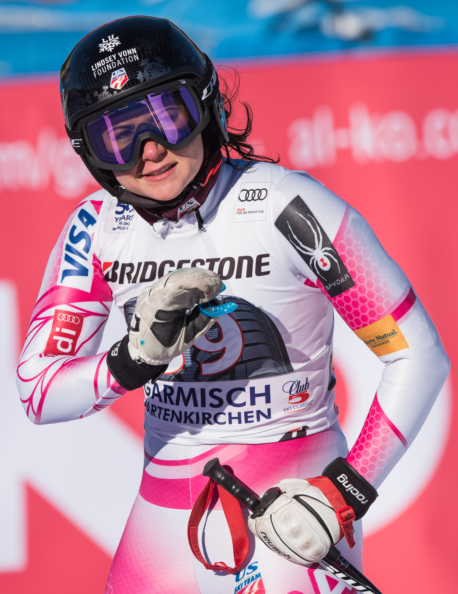 64. Kandahar Rennen,Audi FIS Ski Weltcup Garmisch-Partenkirchen,Damen Super-G,Jacqueline Wiles,Kandahar,Ladies Super-G